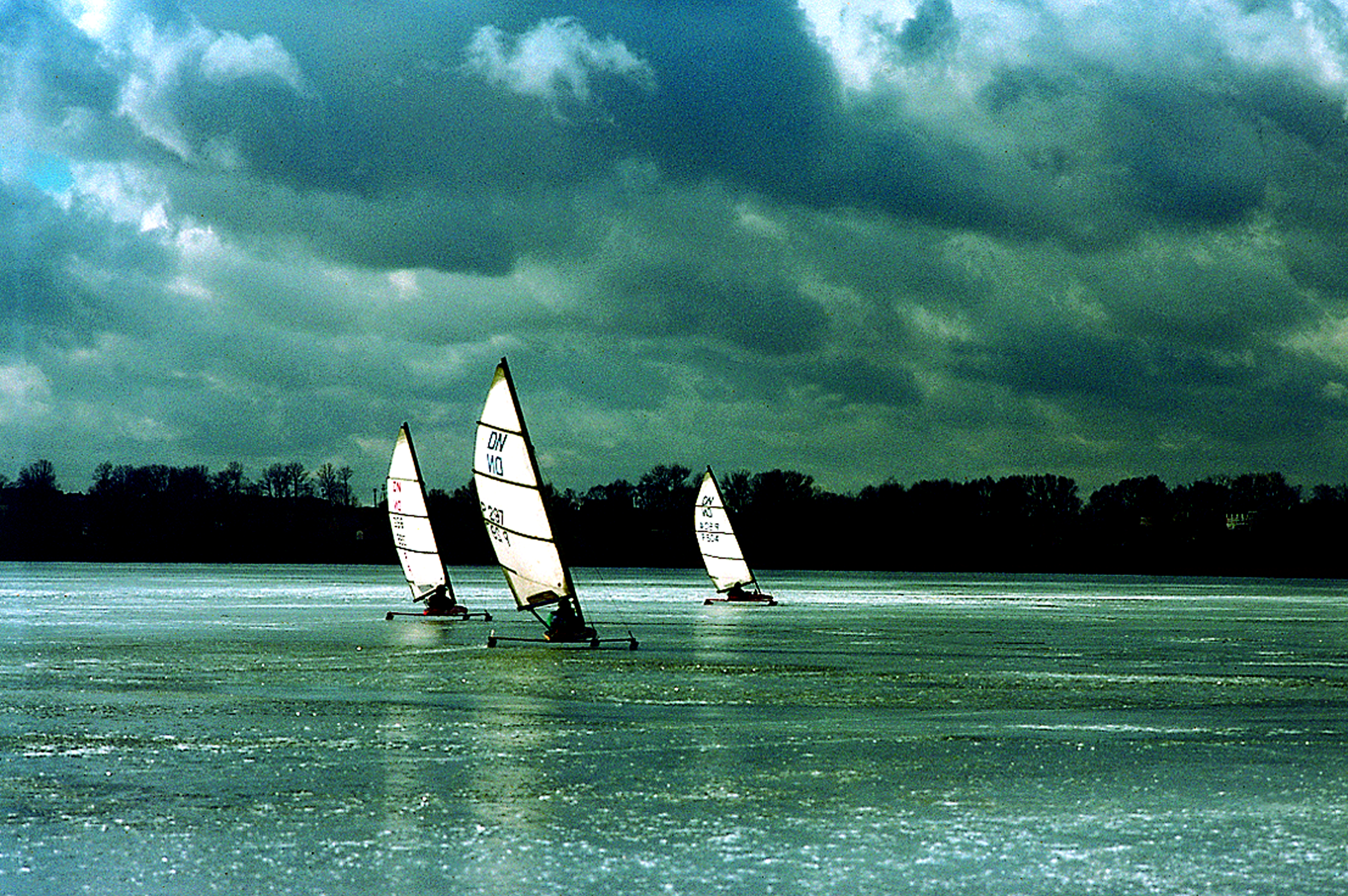 Bojery klasy DN na Jeziorze Małym w Żninie